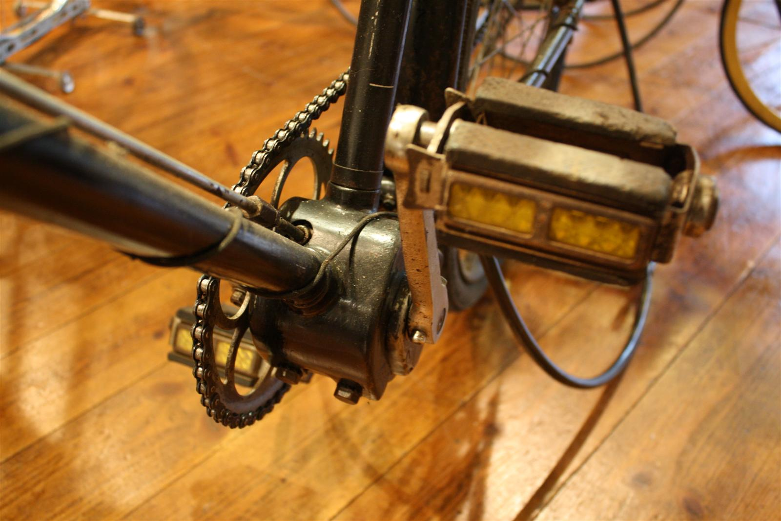 Historische Tretlagerschaltung (Hersteller Brennabor, Sammlung Jürgen Voigts)